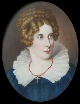 Portraitminiatur der Annette von Droste-Hülshoff; leicht veränderte Kopie des Porträts, das wahrscheinlich Jenny von Droste-Hülshoff um 1820 malte; 10,5 x 8,5 cm (mit Rahmen, hier entfernt)